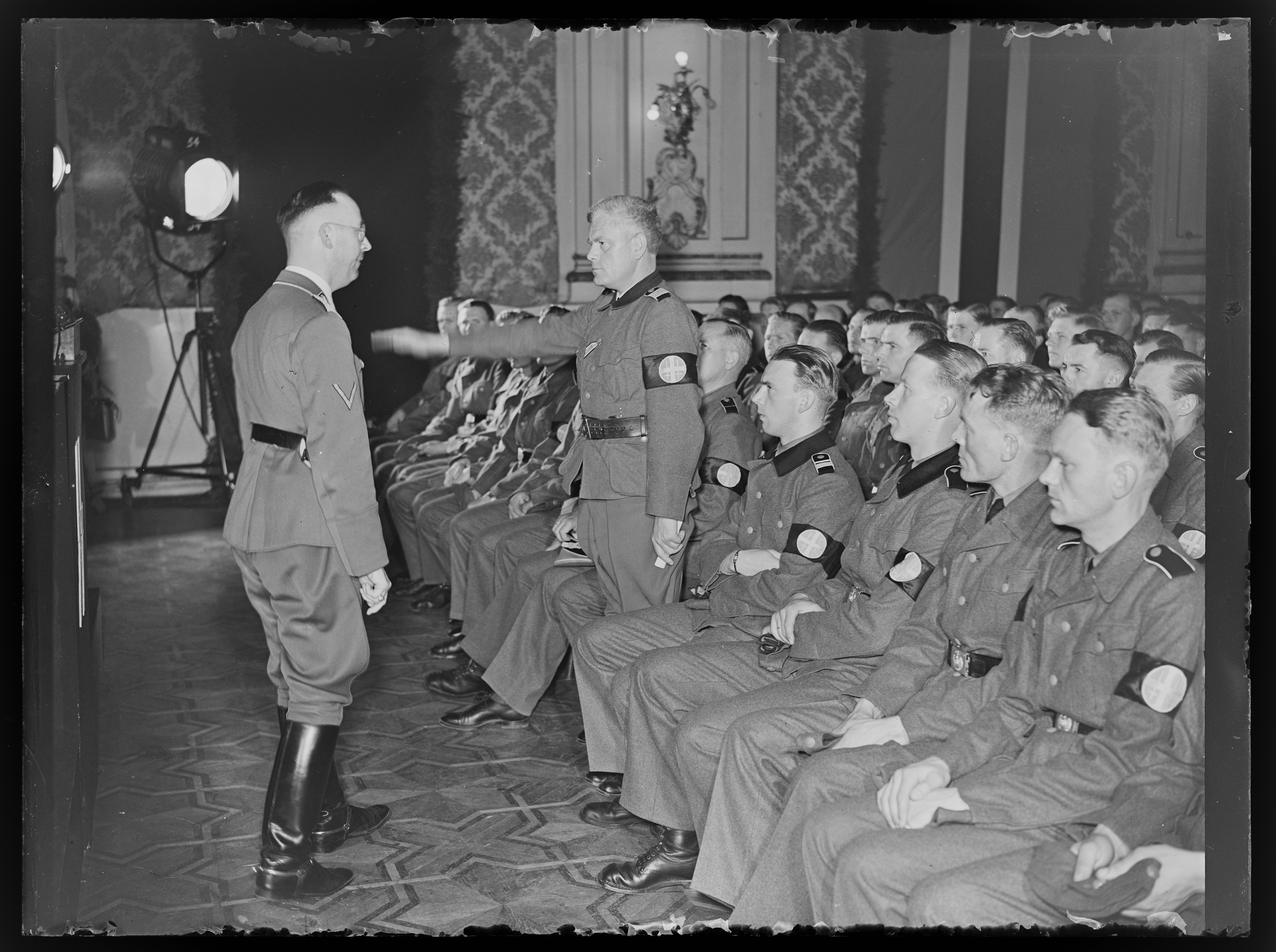 Norges SS. Edsavleggelsen